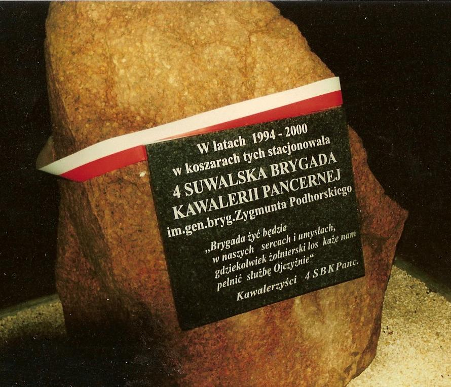 tablica pamiątkowa 4 Brygady Kawalerii Pancernej z Orzysza